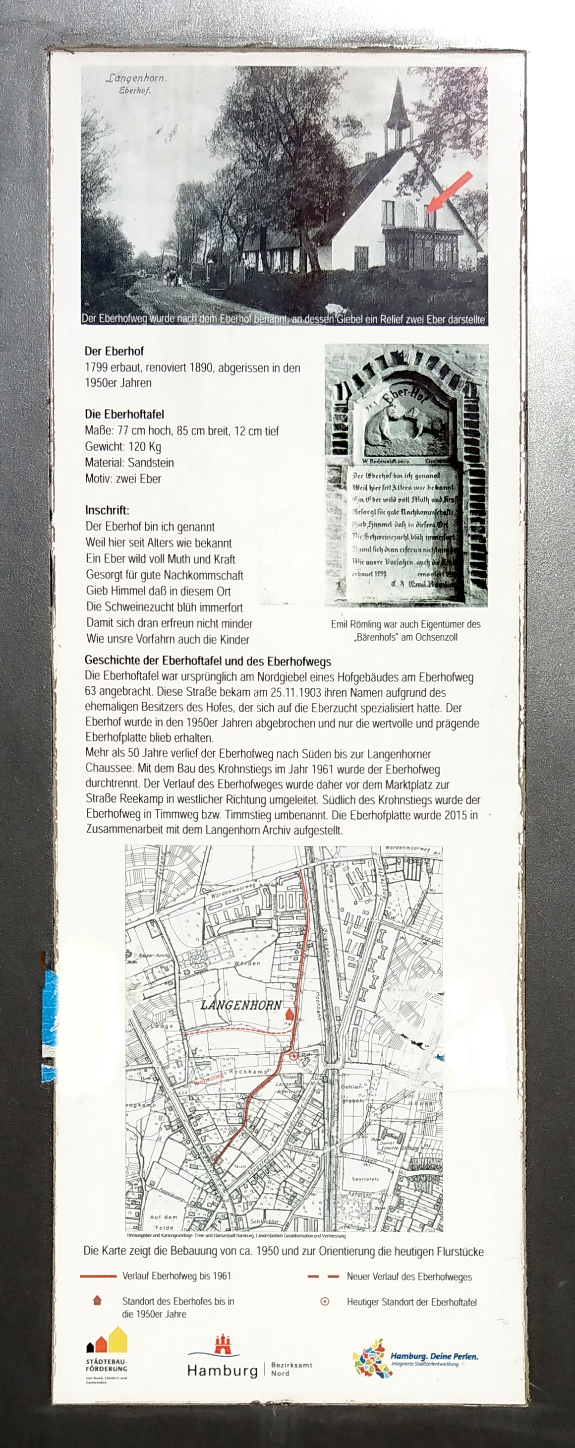 Sachautafel Eberhof auf dem Langenhorner Markt (Reste von Aufklebern zum größten Teil wegretouchiert). Da das rechte Schwein Zitzen hat, sind hier nicht zwei Eber abgebildet, wie auf der Tafel steht, sondern ein Eber und eine Sau. Die Tafel steht genau neben dem Relief: Relief